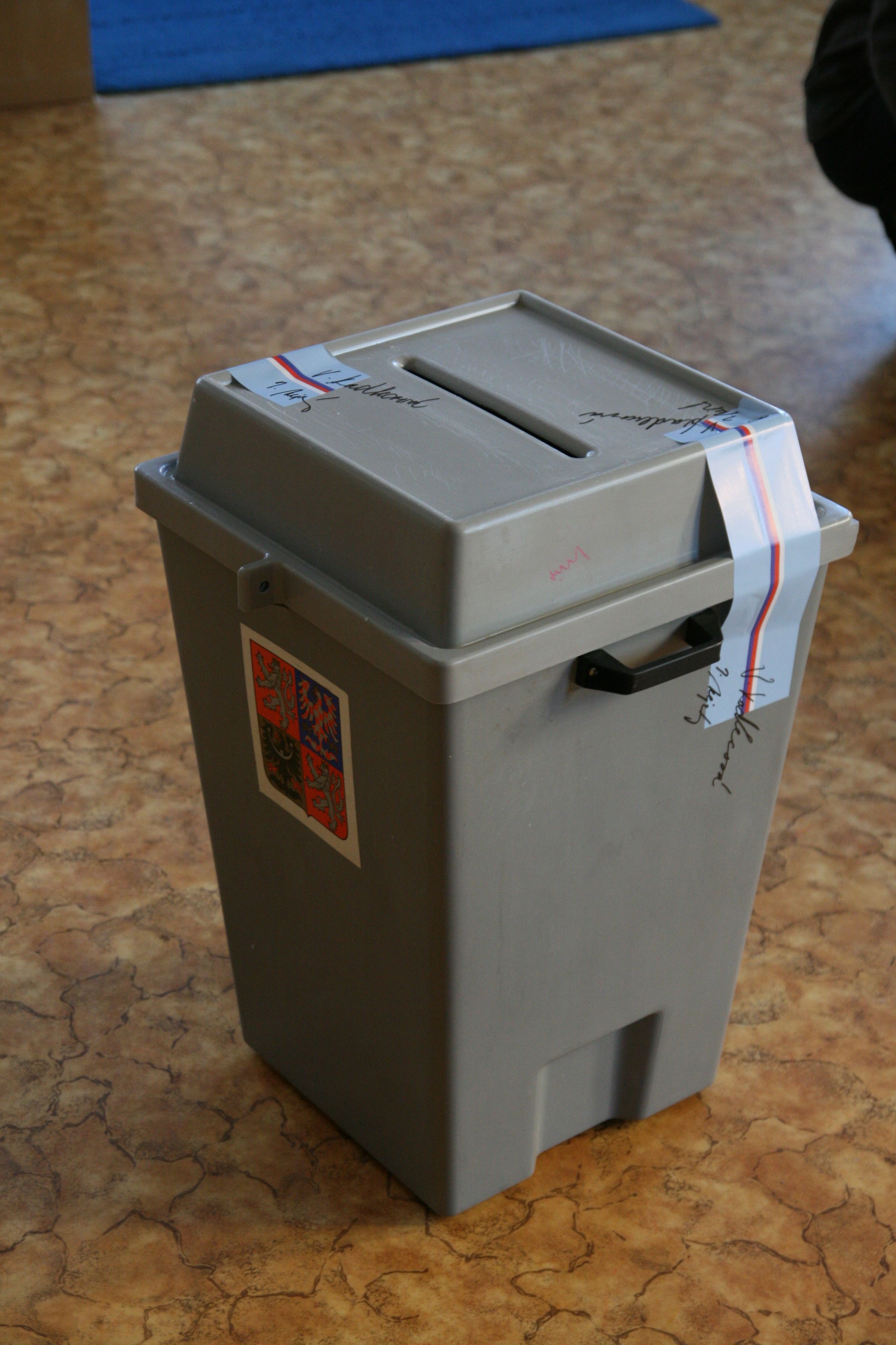 Volby do zastupitelstva Jihomoravského kraje 7.-8. října 2016 spojené v Brně s referendem o hlavním vlakovém nádraží.